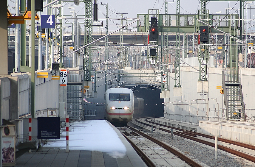 Bahnhof Ingolstadt Nord mit Testzug "ICE-S", Blick von Gleis 4 nach Norden.